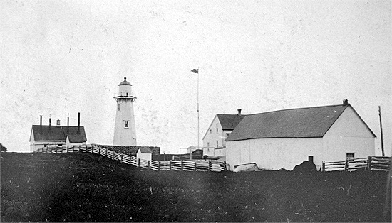 Le phare du Cap-de-la-Madeleine.